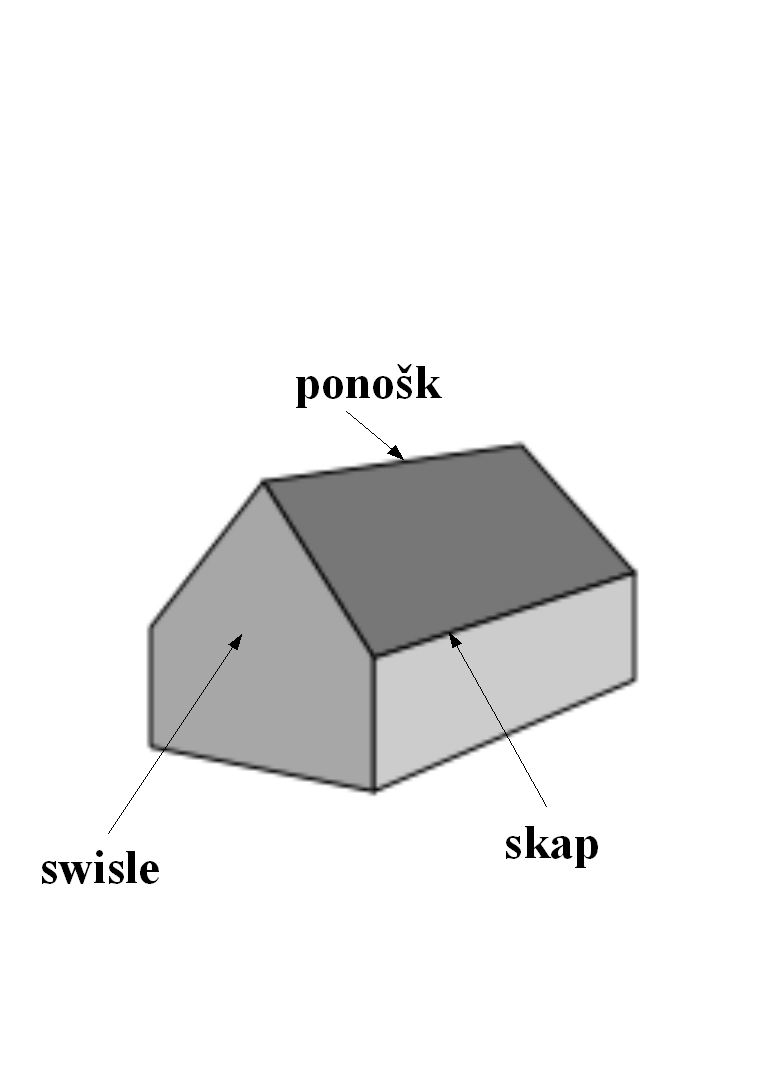 dzele trechi